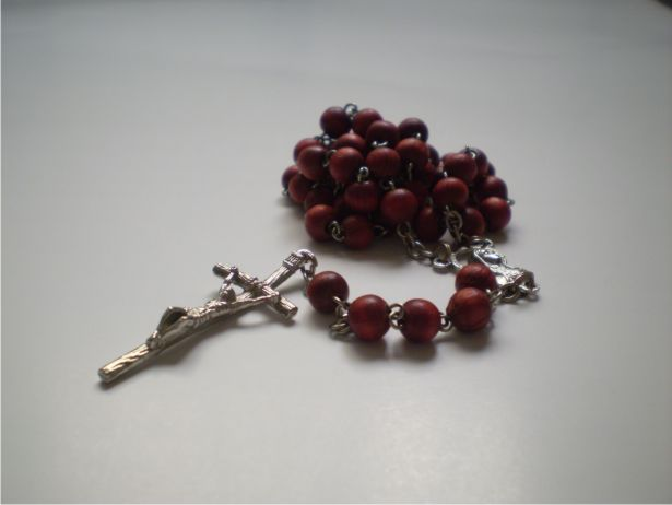 ảnh chụp bộ tràng hạt mân côi